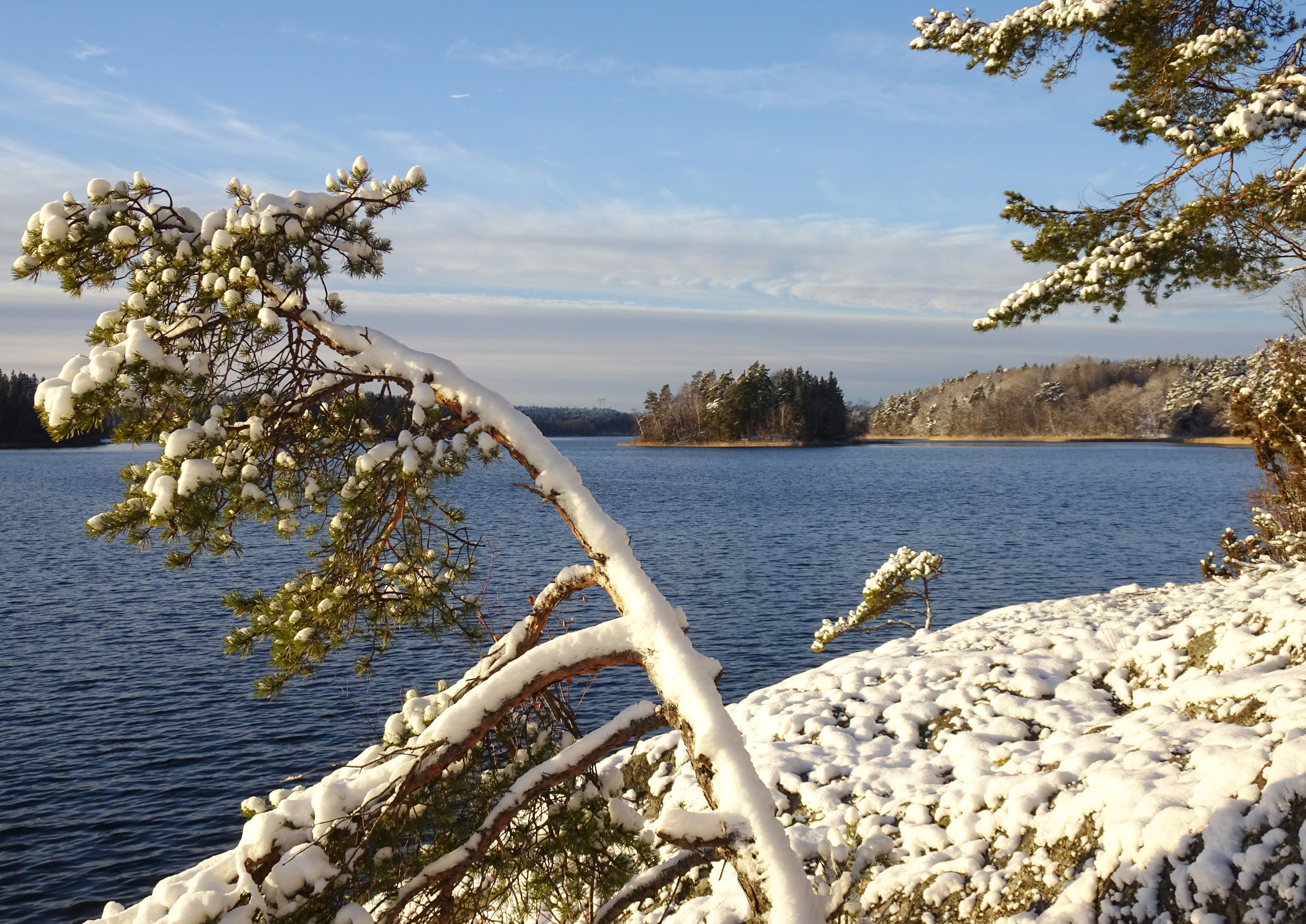 Bornsjön, vy mot väster från norra stranden med Oxhaga holme i bakgrunden